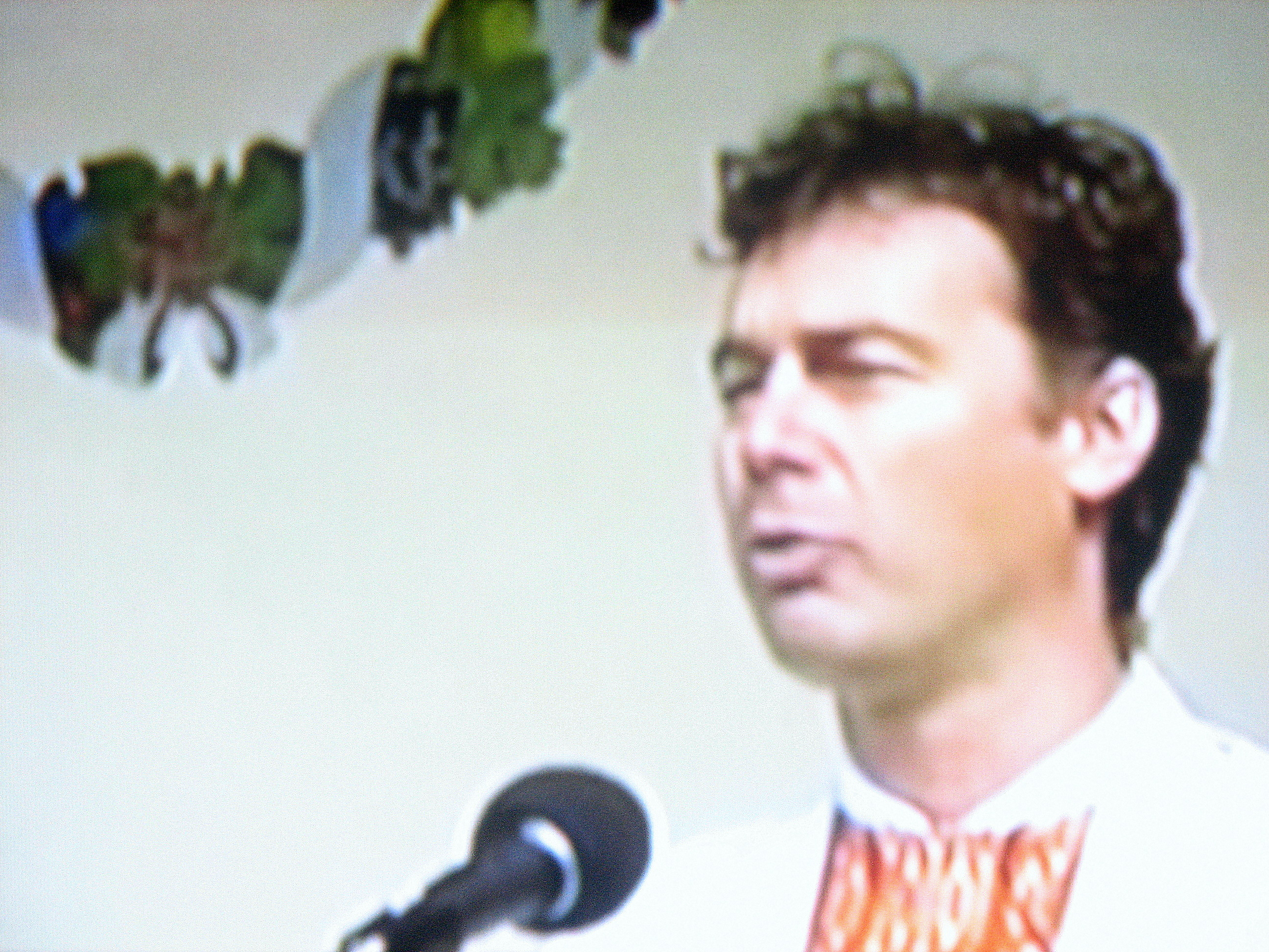 Roman Musil